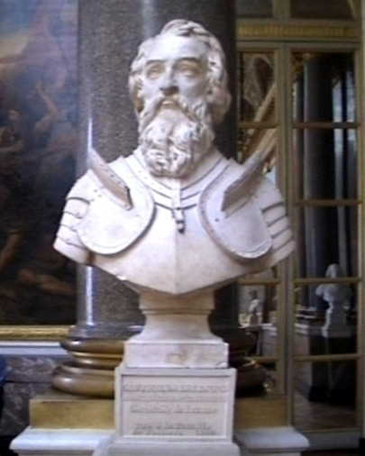 Buste de la Galerie des Batailles du château de Versailles